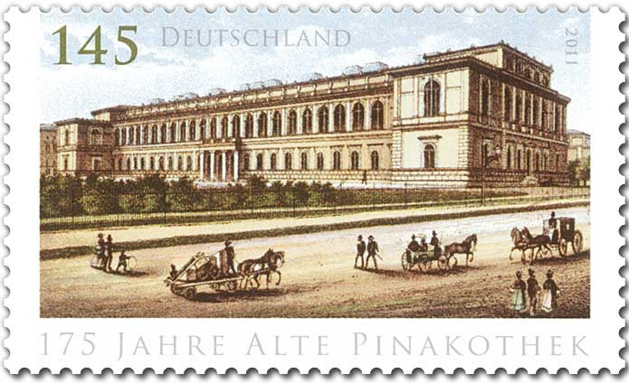 Postwertzeichen "175 Jahre Alte Pinakothek" (2011), 1,45 Euro, 44,20 x 26,20 mm (Beschreibung)